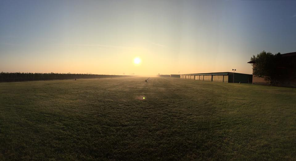 Campo di volo Aerlight Faenza, panoramica scuola di volo